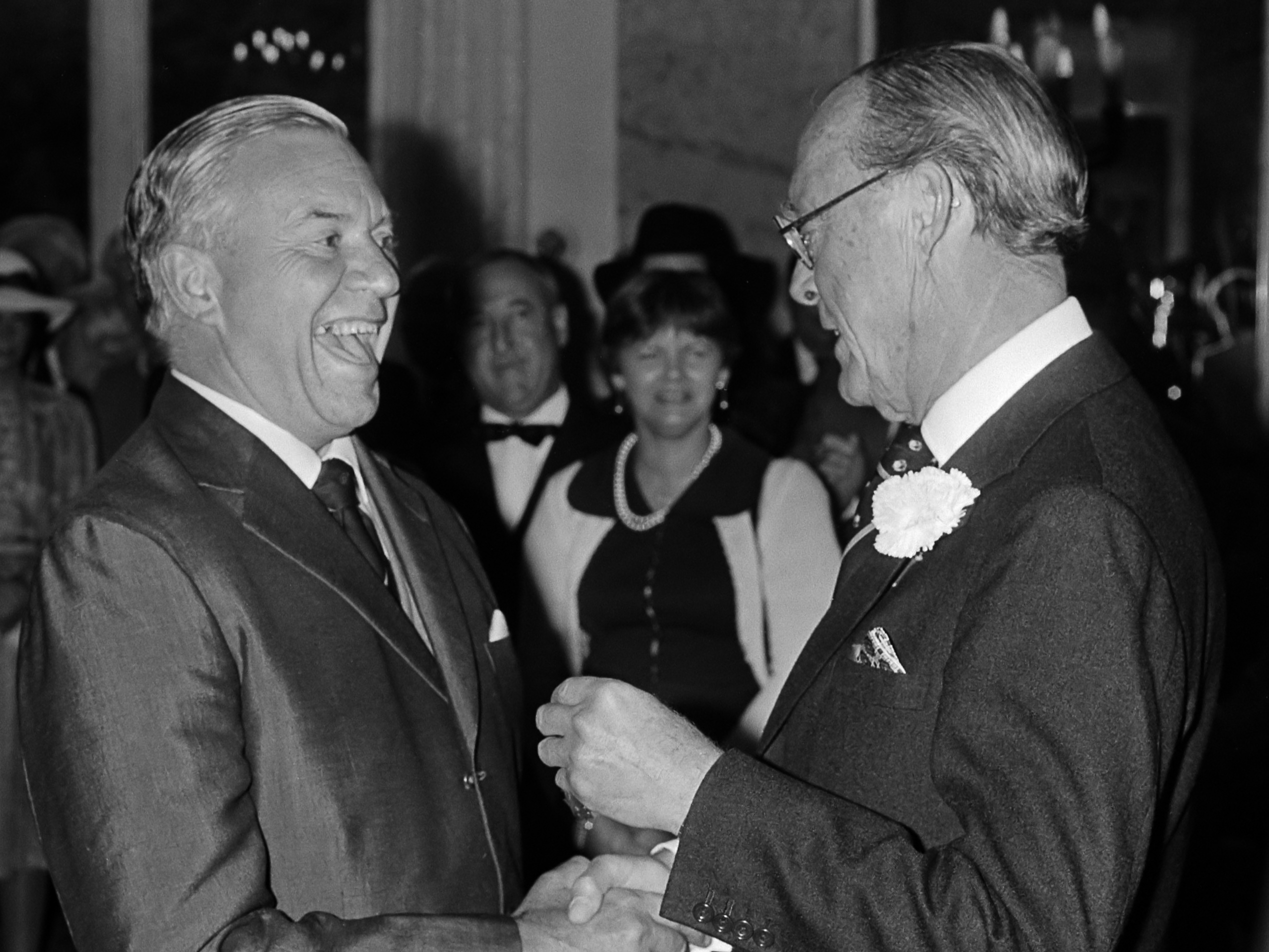 By Paleis Soestdijk het Prins Bernhard 'n aantal Goue Ark-toekenings uitgeryk vir verdienstelike bydraes op die gebied van flora en fauna. Prins Bernhard dra hier die toekenning oor aan die Suid-Afrikaner Ian Player (links), op 3 Oktober 1981.